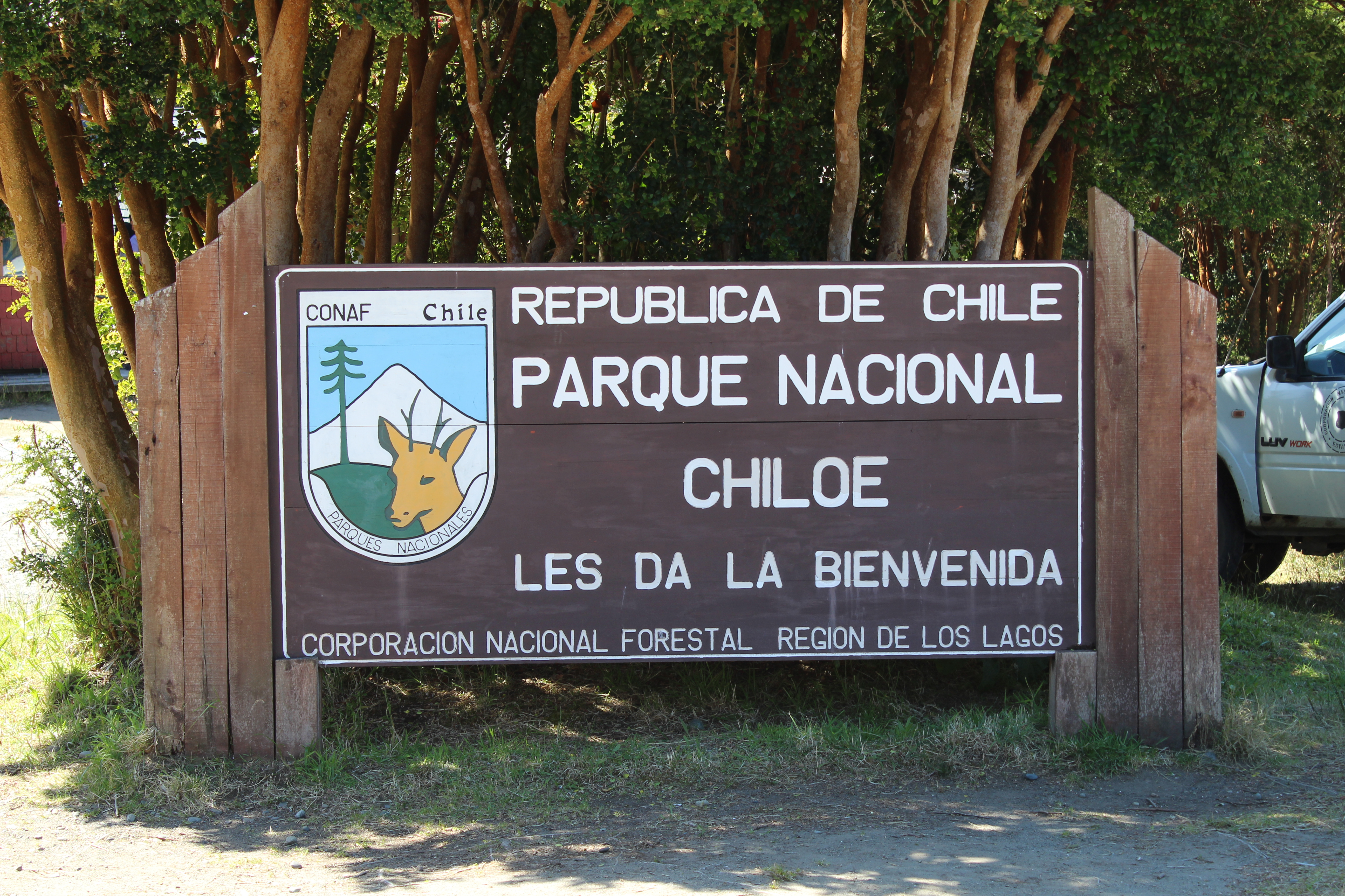 Parque Nacional Chiloé, Región de Los Lagos, Chile.